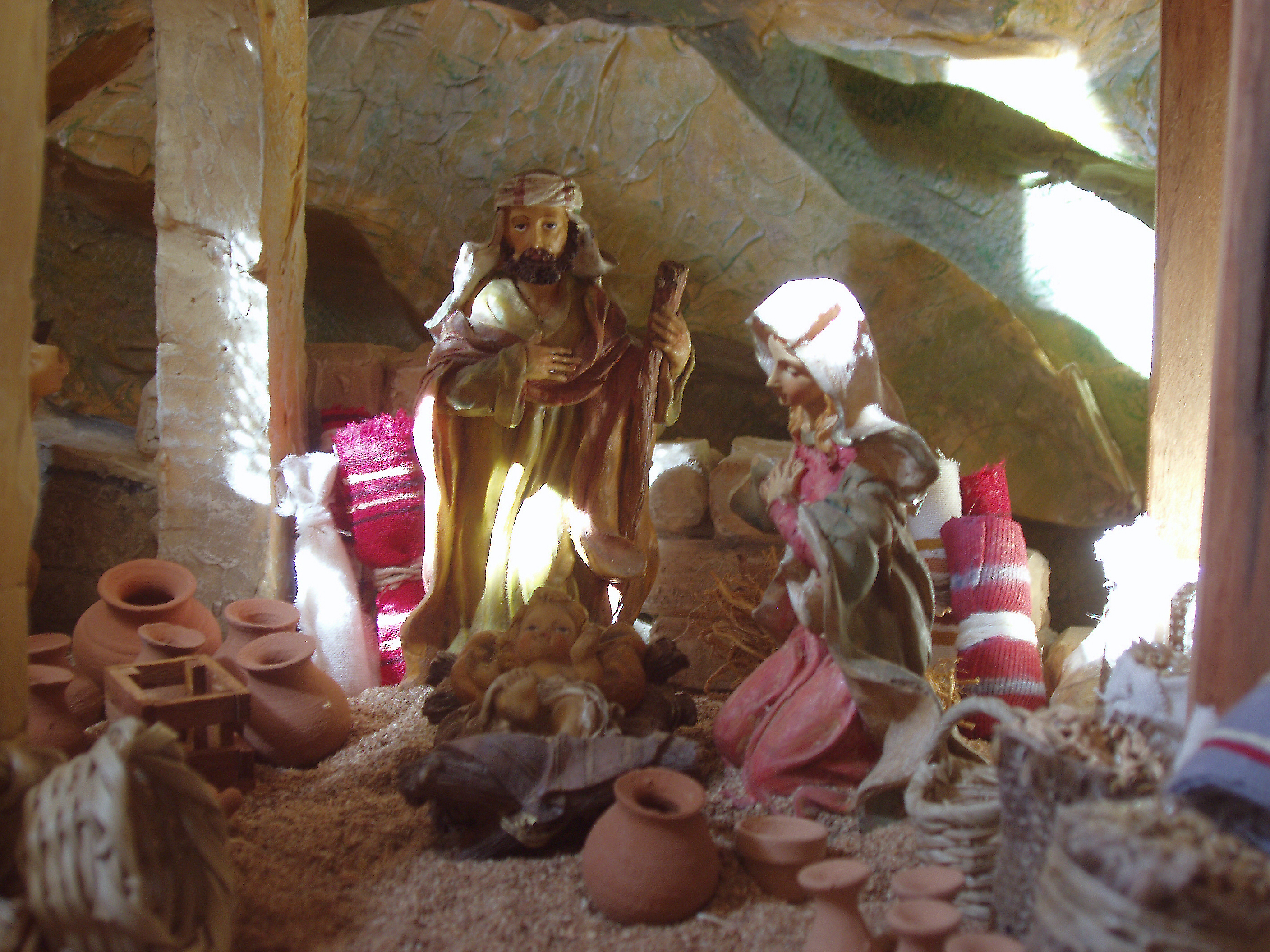 nacimiento - costa rica